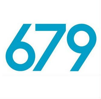 Description Logo de fr:679 Artists Date9 avril 2011 à 19:33 (CEST) Logo de fr:679 Artists